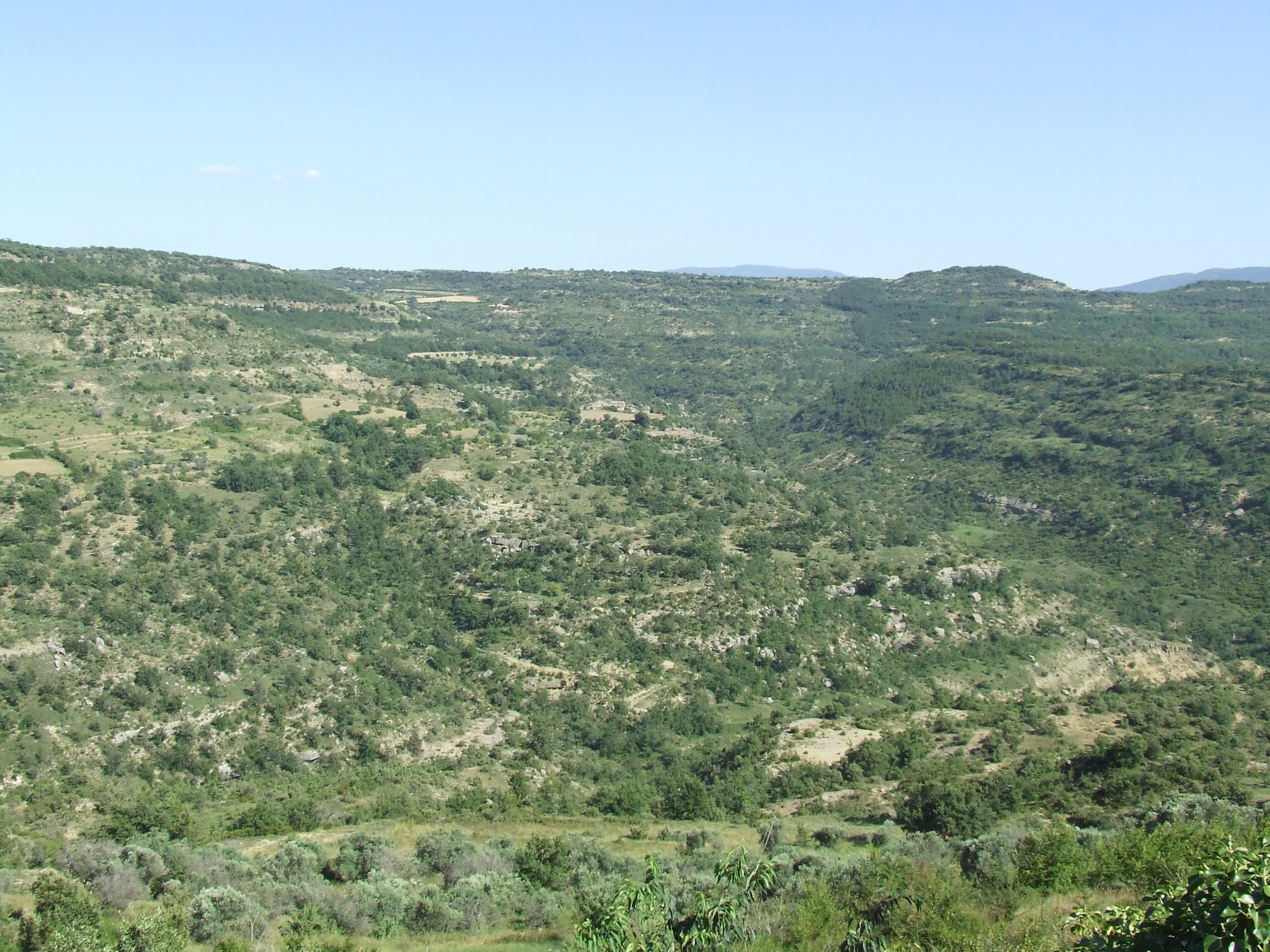 Mas de l'Hereu (el Meüll, Castell de Mur, Pallars Jussà)